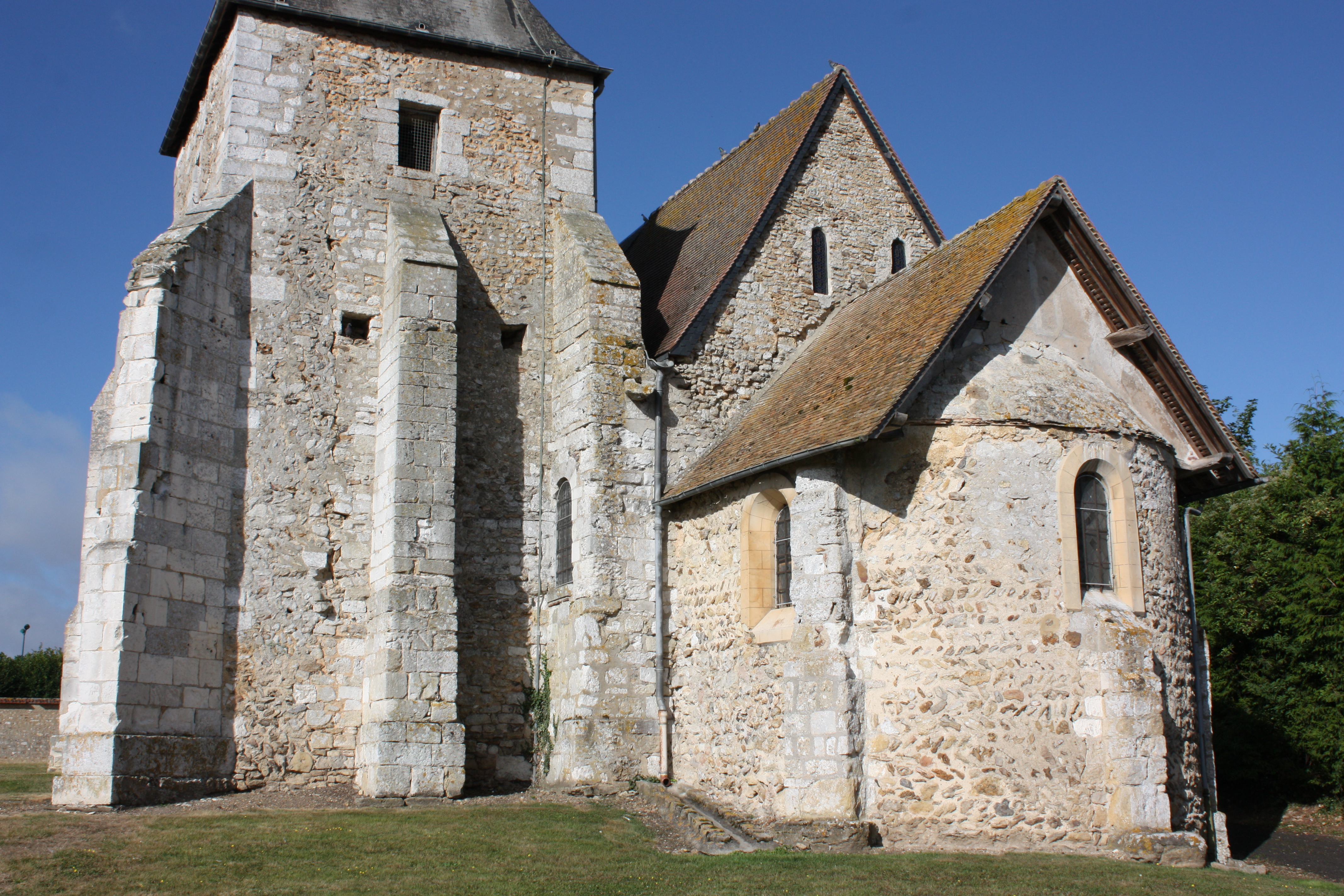 Venables - Eglise Notre-Dame Vue générale du Sud-Est